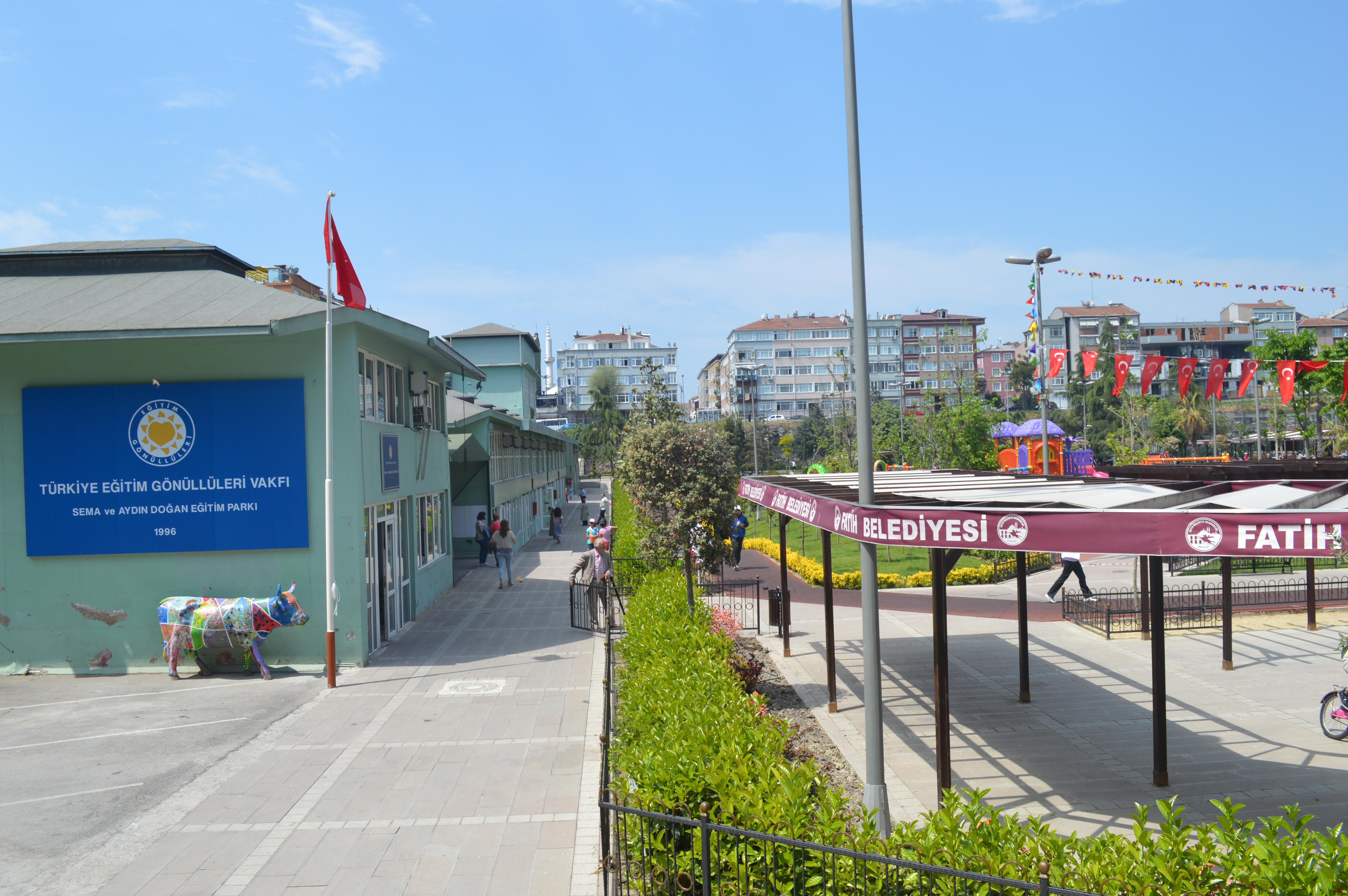 Türkiye Eğitim Gönüllüleri Vakfı Sema Aydın Doğan Eğitim Parkı